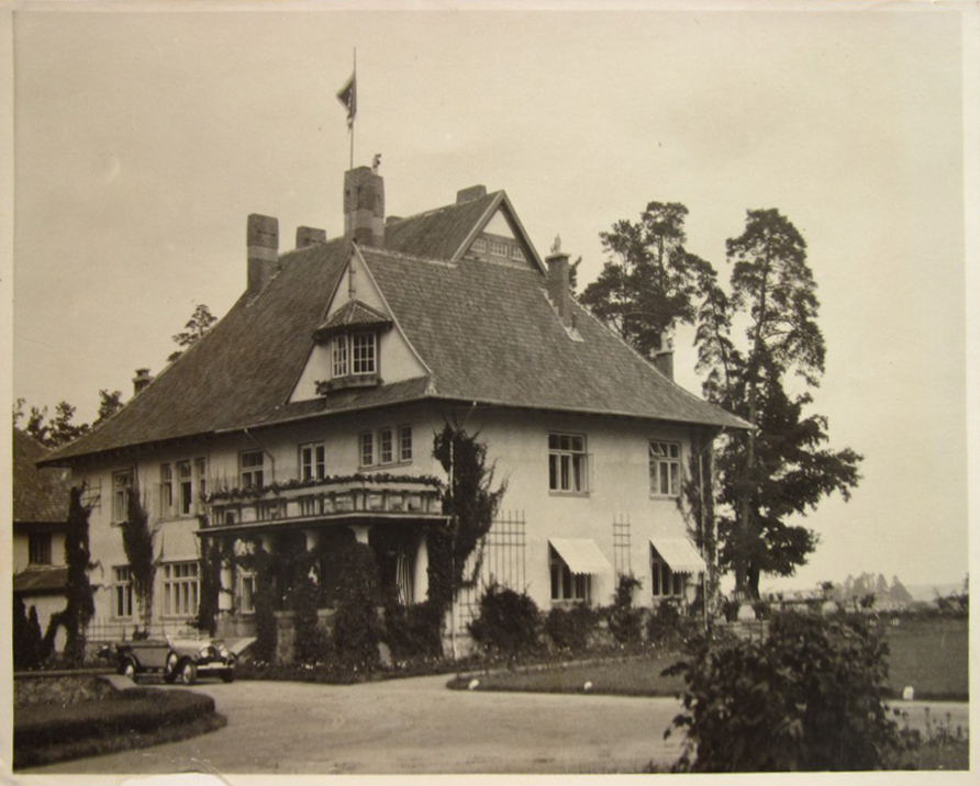 Беларуская (тарашкевіца): Варапаева (Varapajeva), сядзіба Празьдзецкіх (Praździecki)